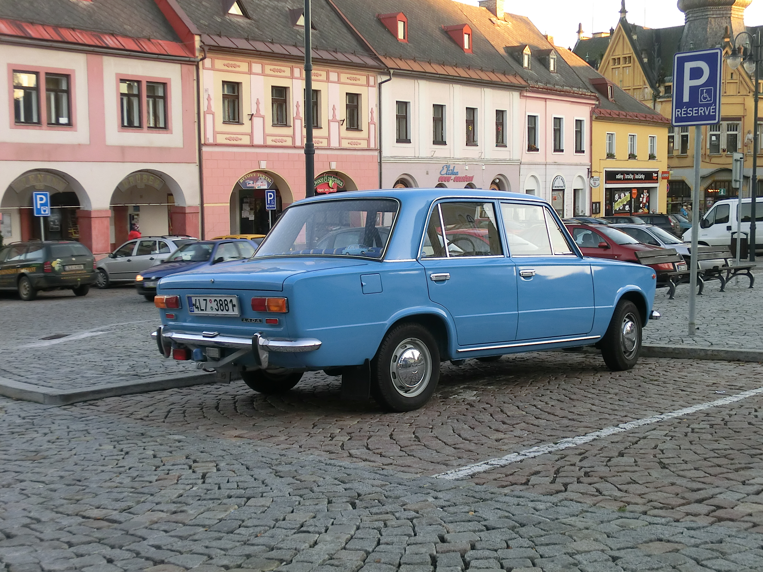 Pěkně zrenovovaný žigulík na náměstí v Jilemnici.